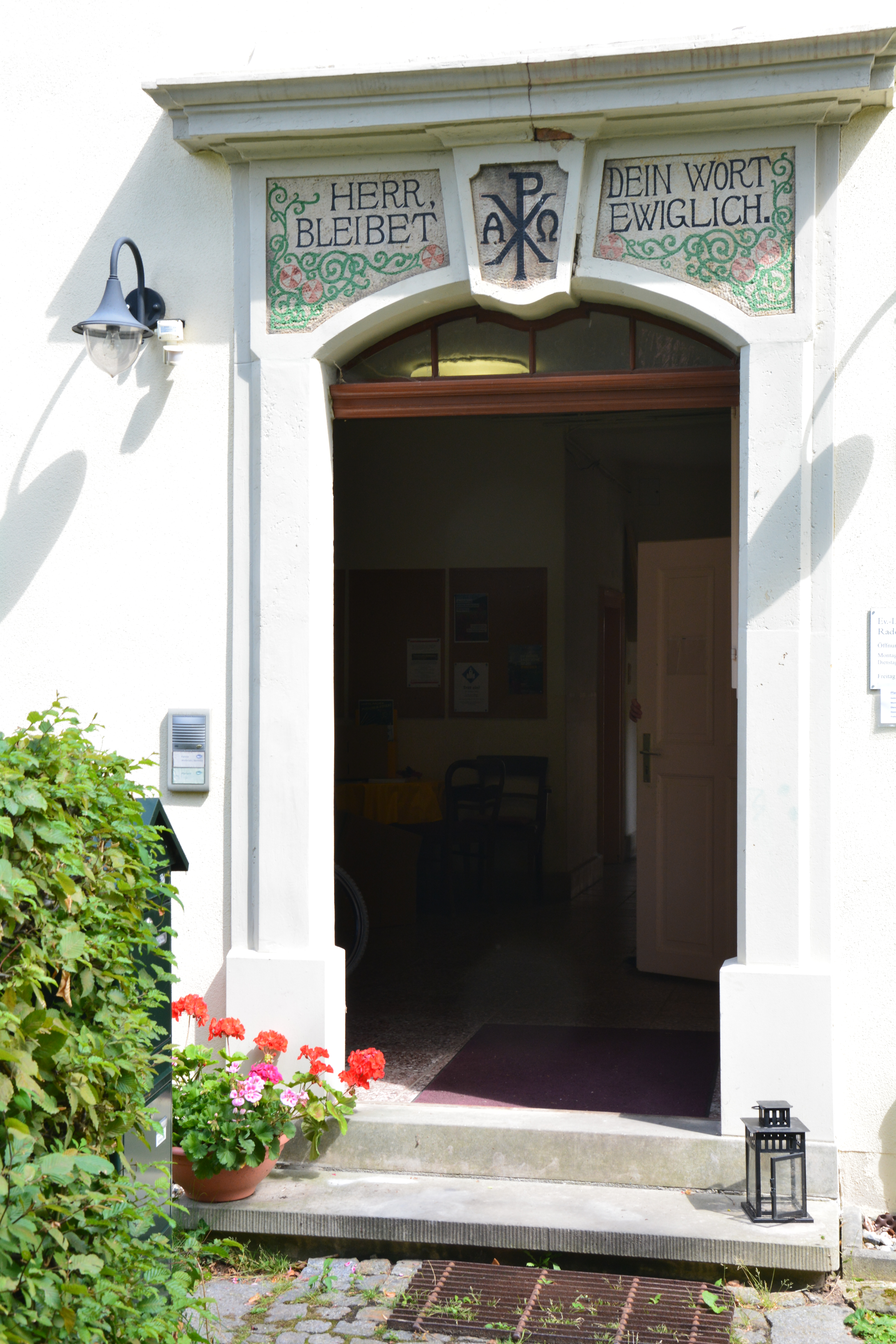 Stadtkirche "Zum Heiligen Namen Gottes" Radeberg, Pfarramt